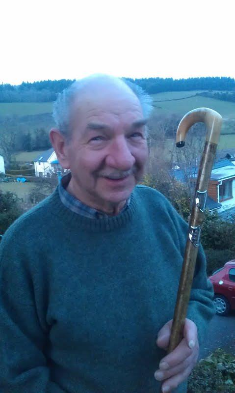 'ffon barch' Parêd Gwyl Dewi Aberystwyth